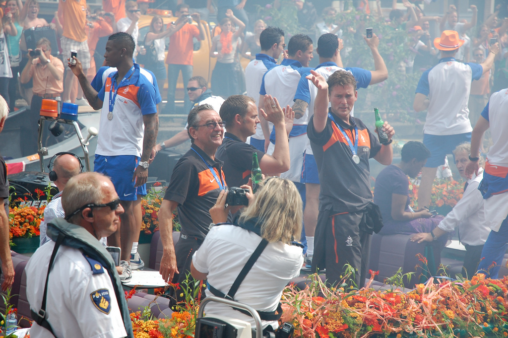 Eljero Elia